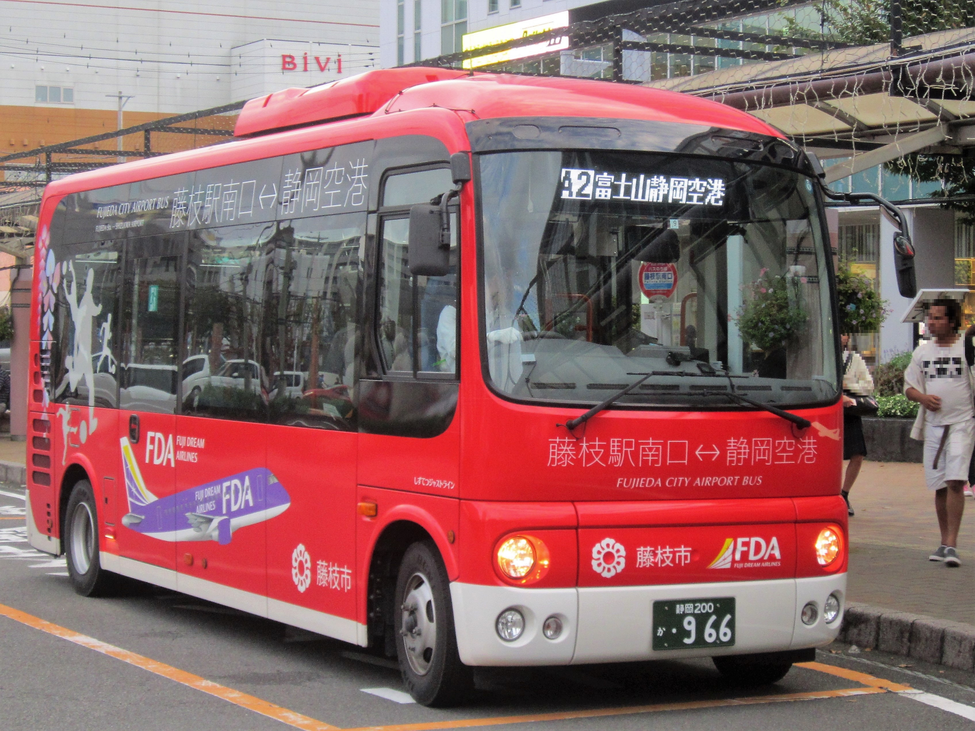 藤枝駅前に停車中の藤枝市富士山静岡空港アクセスバス（藤枝市自主運行バス）